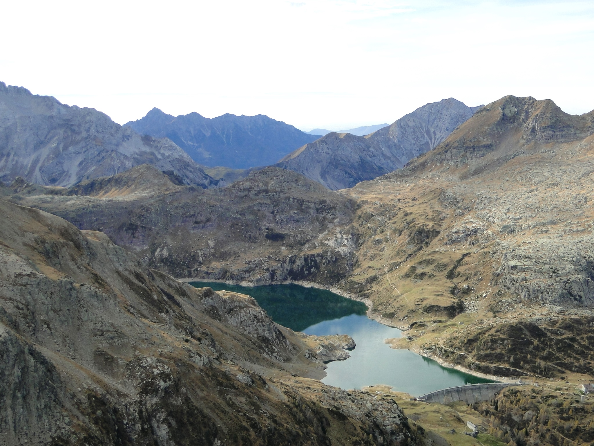 Laghi Gemelli, prealpi Orobie, valle Brembana, Bergamo